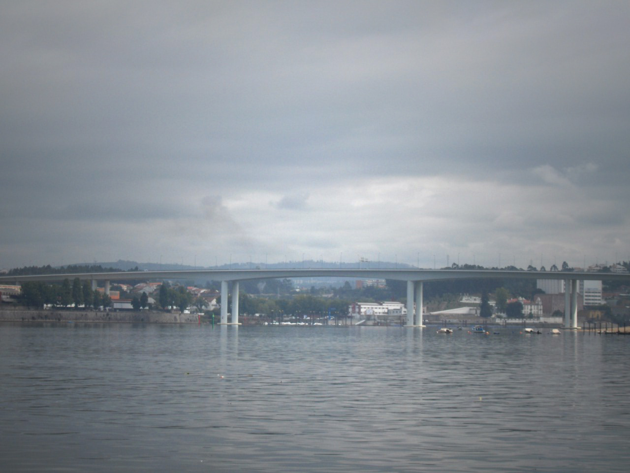 Ponte do Freixo; bridge over the Douro river, Porto, Portugal